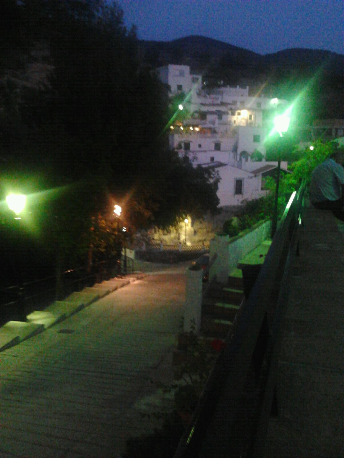 Barrio del Barranco